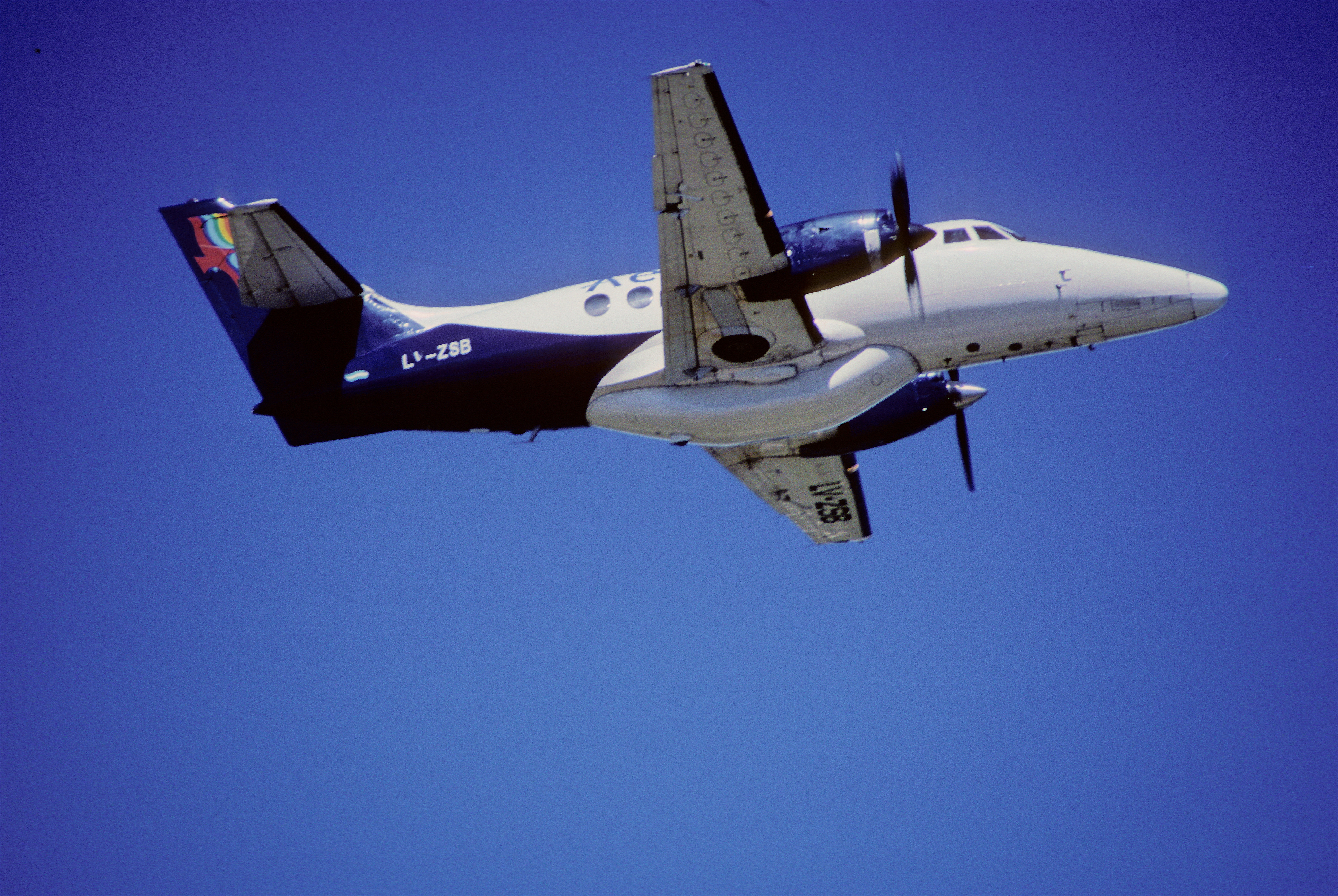 320co - AeroVIP BAe Jetstream 31; LV-ZSB@AEP;23.09.2004